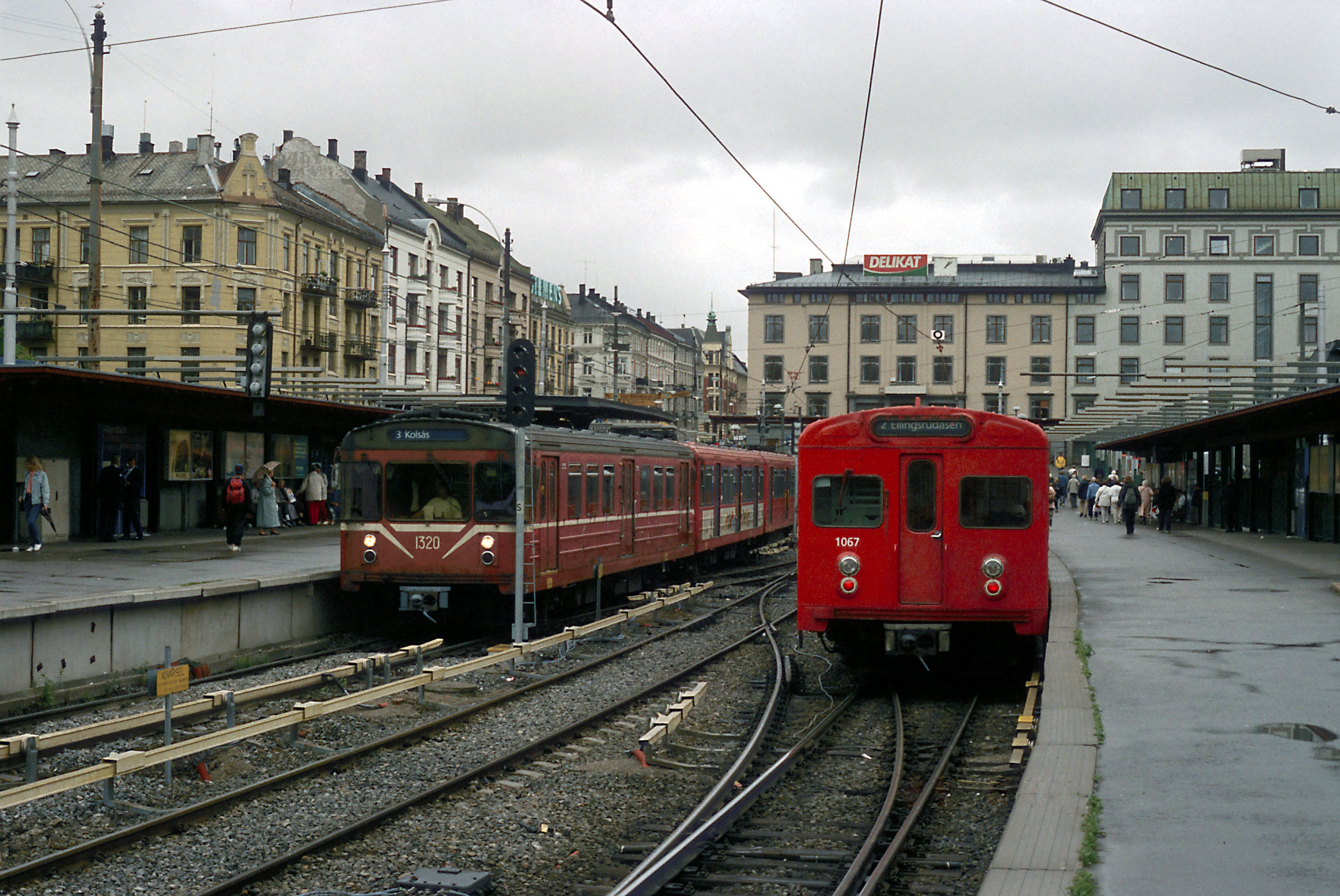 Zug der Reihe T1300 Richtung Kolsås und der Reihe T1000 nach Ellingsrudåsen. Die Fahrleitung ist noch vorhanden und in Betrieb, in Richtung Tunnel verkehren die Züge aber vollständig im Stromschienenbetrieb.